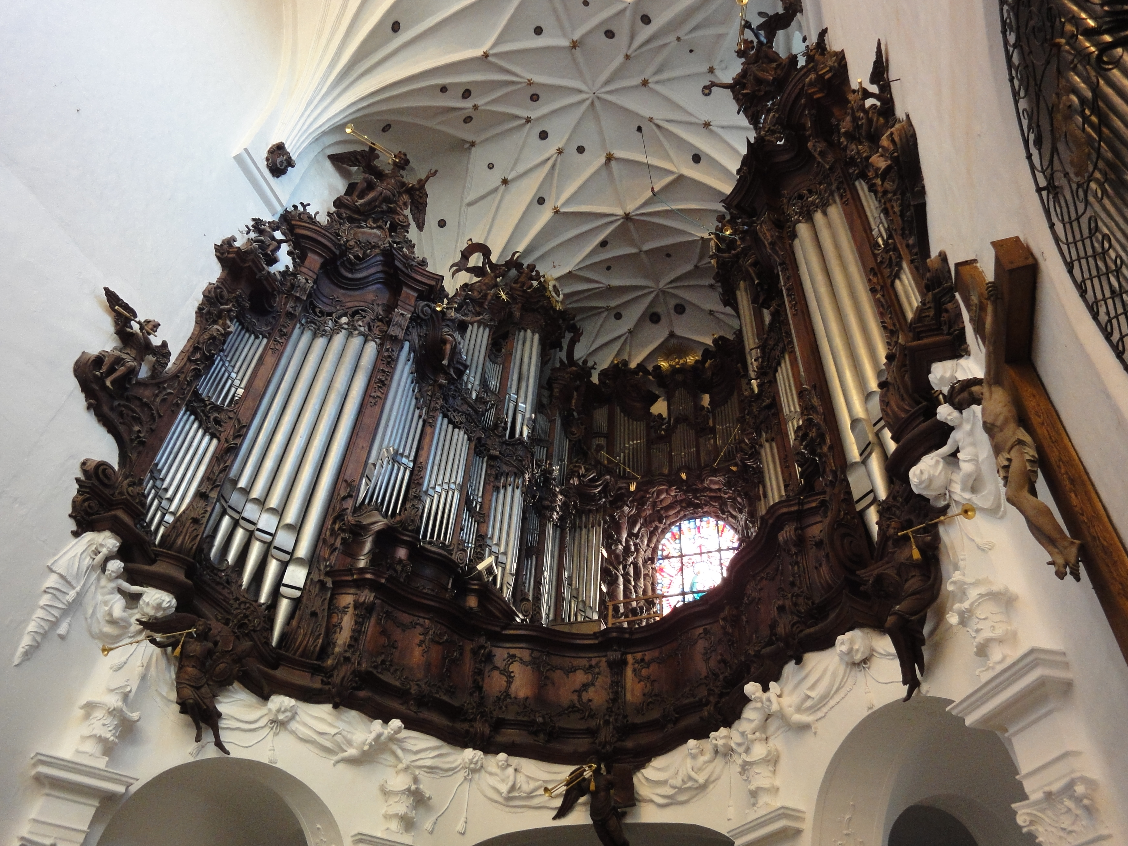 Organy w katedrze oliwskiej